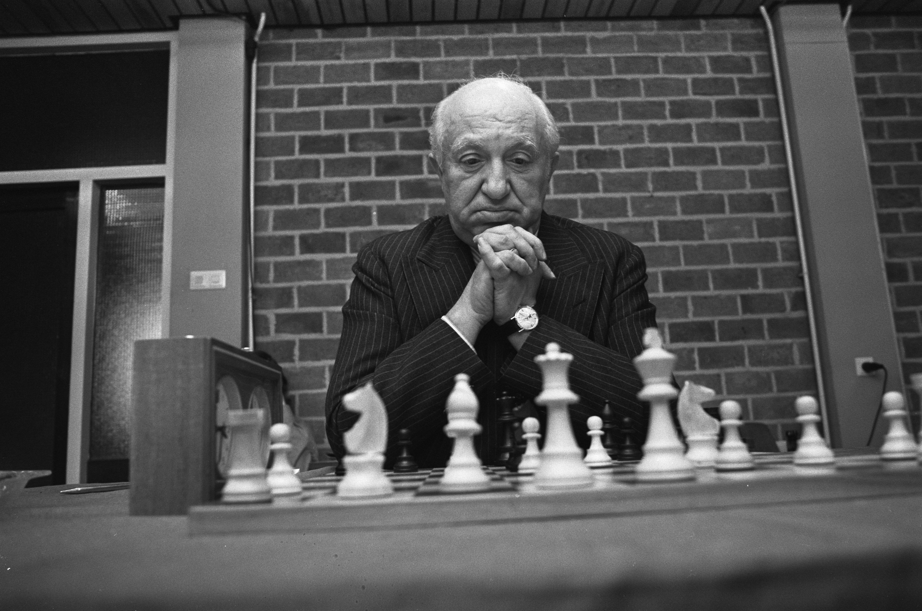 Collectie / Archief : Fotocollectie Anefo Reportage / Serie : [ onbekend ] Beschrijving : Hoogoven-schaaktoernooi Wijk aan Zee , nummer 7 Najdorf, nummer 10 Langeweg Datum : 24 januari 1973 Locatie : Noord-Holland, Wijk aan Zee Trefwoorden : schaken Persoonsnaam : Najdorf, Miguel Instellingsnaam : Hoogovenschaaktoernooi Fotograaf : Verhoeff, Bert / Anefo Auteursrechthebbende : Nationaal Archief Materiaalsoort : Negatief (zwart/wit) Nummer archiefinventaris : bekijk toegang 2.24.01.05 Bestanddeelnummer : 926-1759